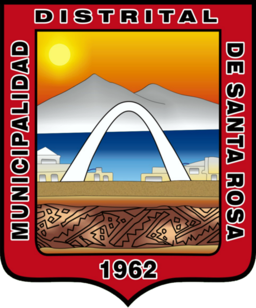 escudo actual